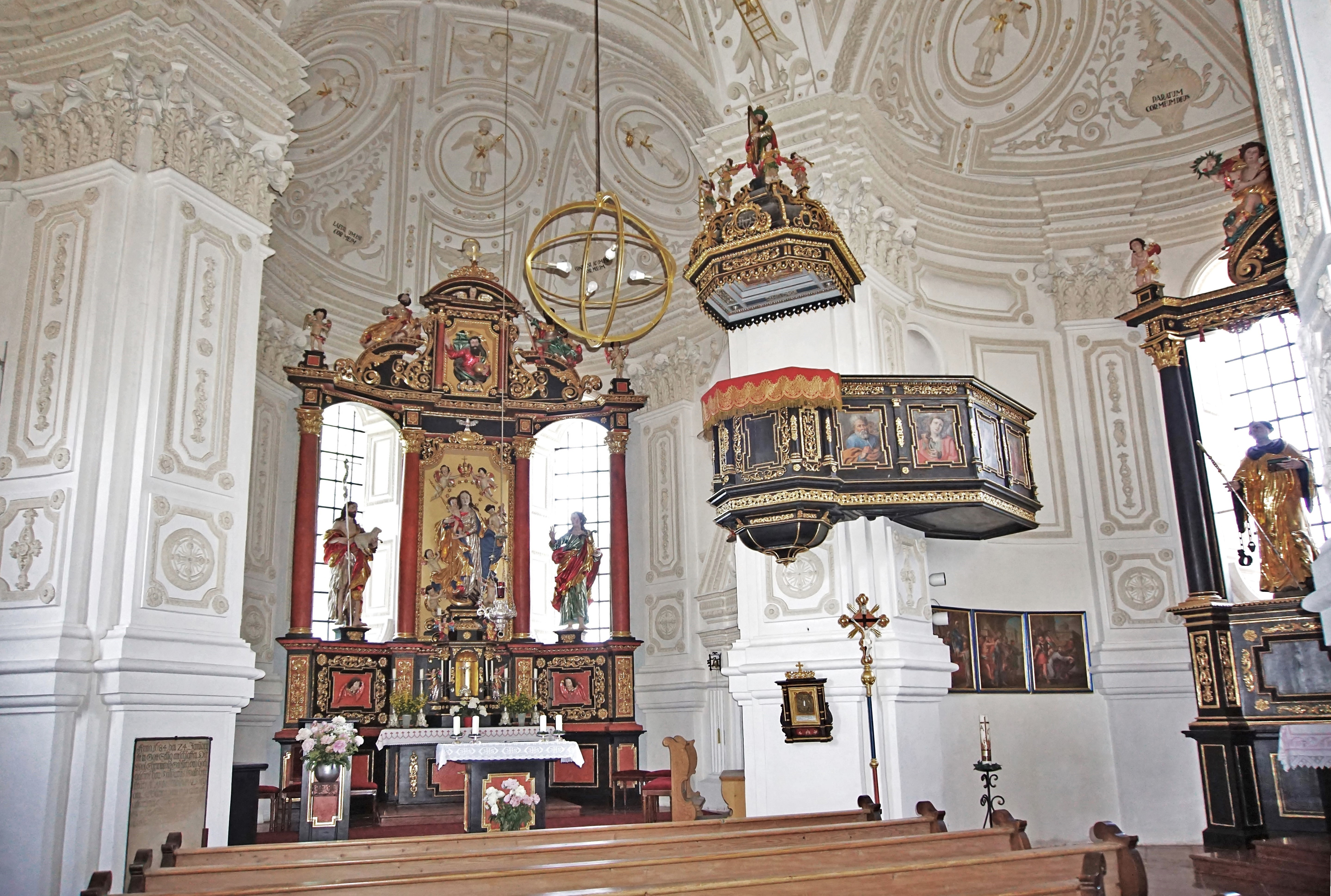 Innenansicht der Filialkirche St. Johann Baptist und Heilig Kreuz in Westerndorf am Wasen (Rosenheim)